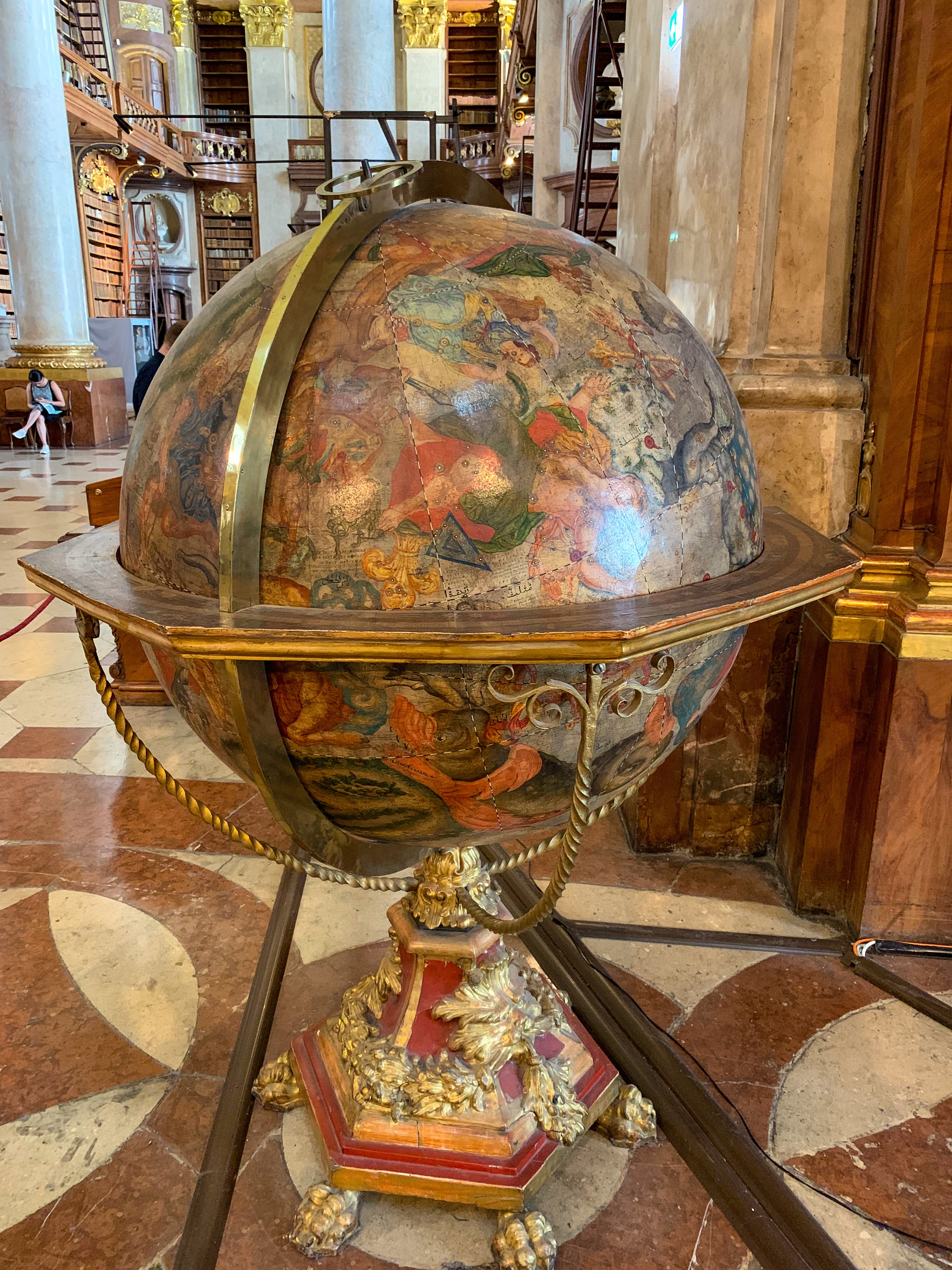 Globus im Prunksaal der Nationalbibliothek